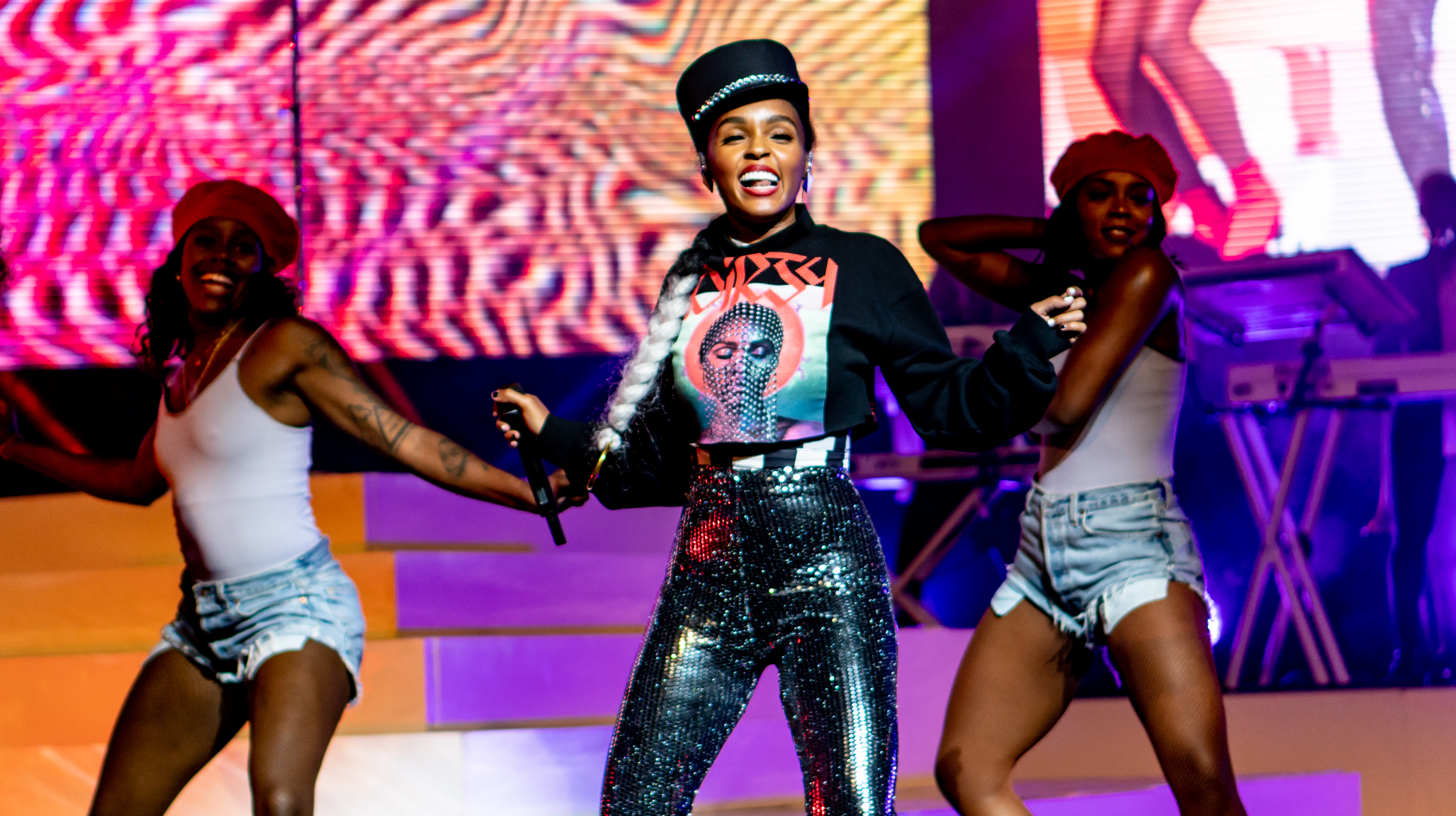 JMonaeHuluMSG190718-65